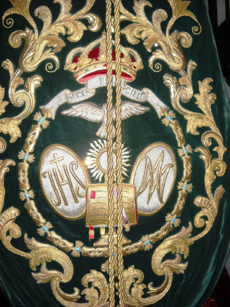 Escudo que aparece en el Bacalao de la Hermandad